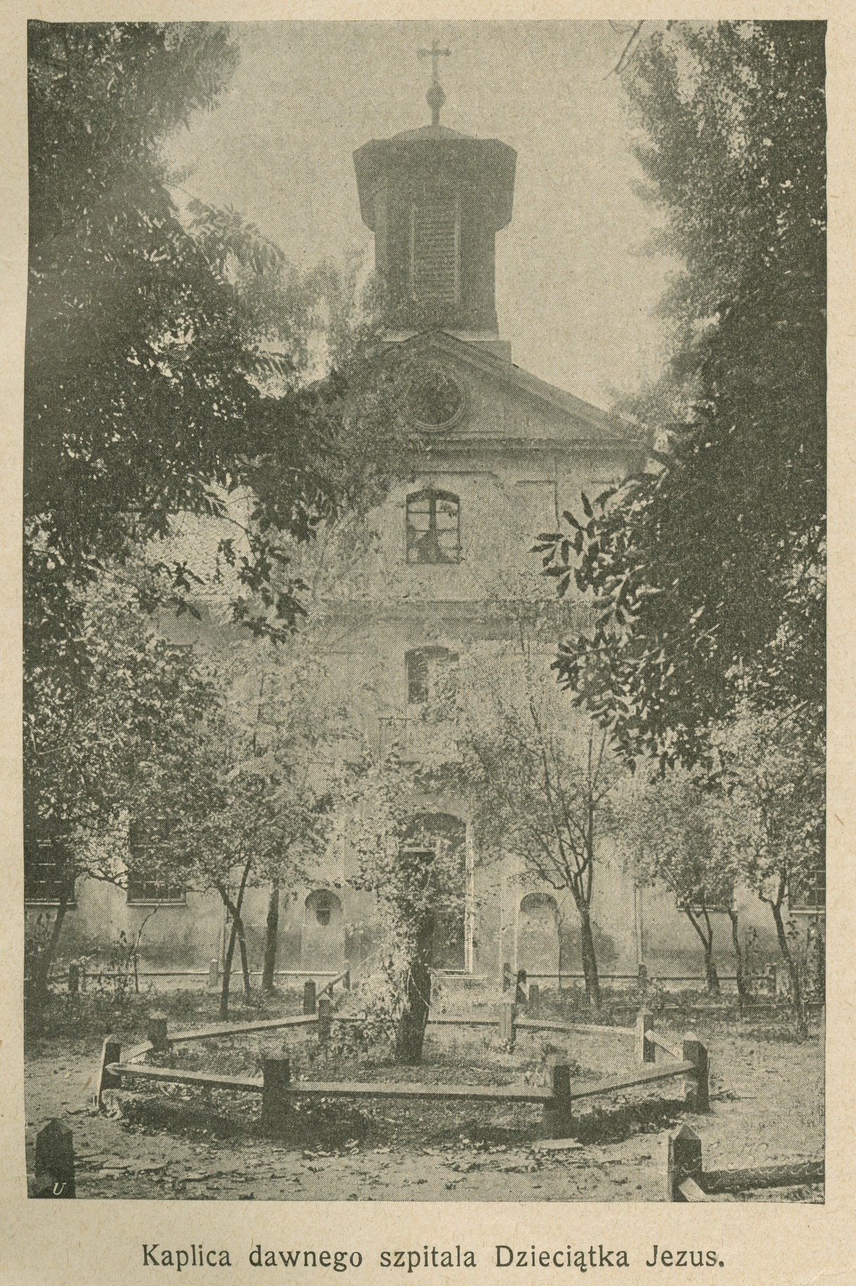 Kaplica dawnego szpitala Dzieciątka Jezus